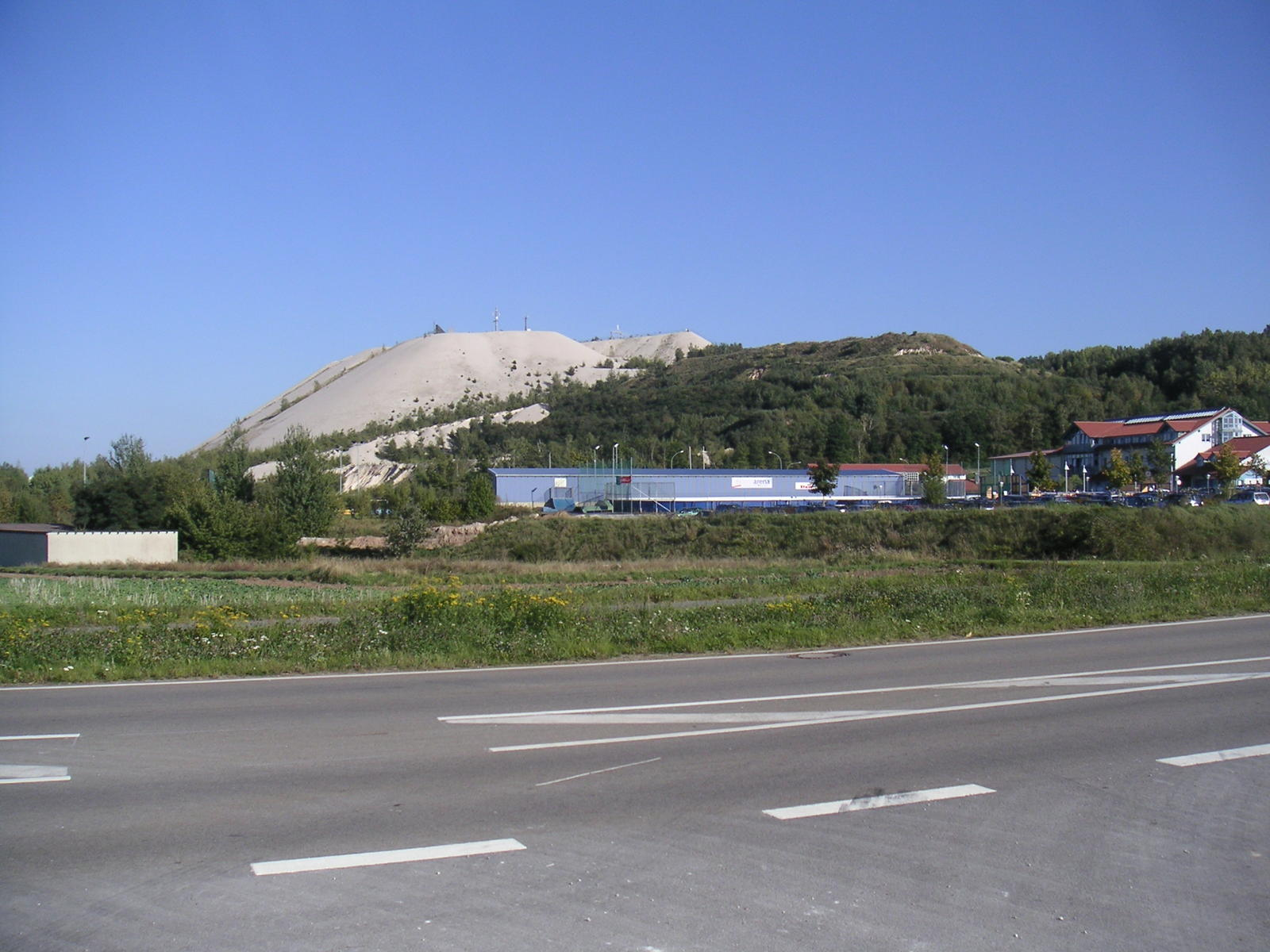 Blick von der AS 18 (Wolfgang-Droßbach-Straße) über den Sportpark Hirschau zum „Monte Kaolino“.